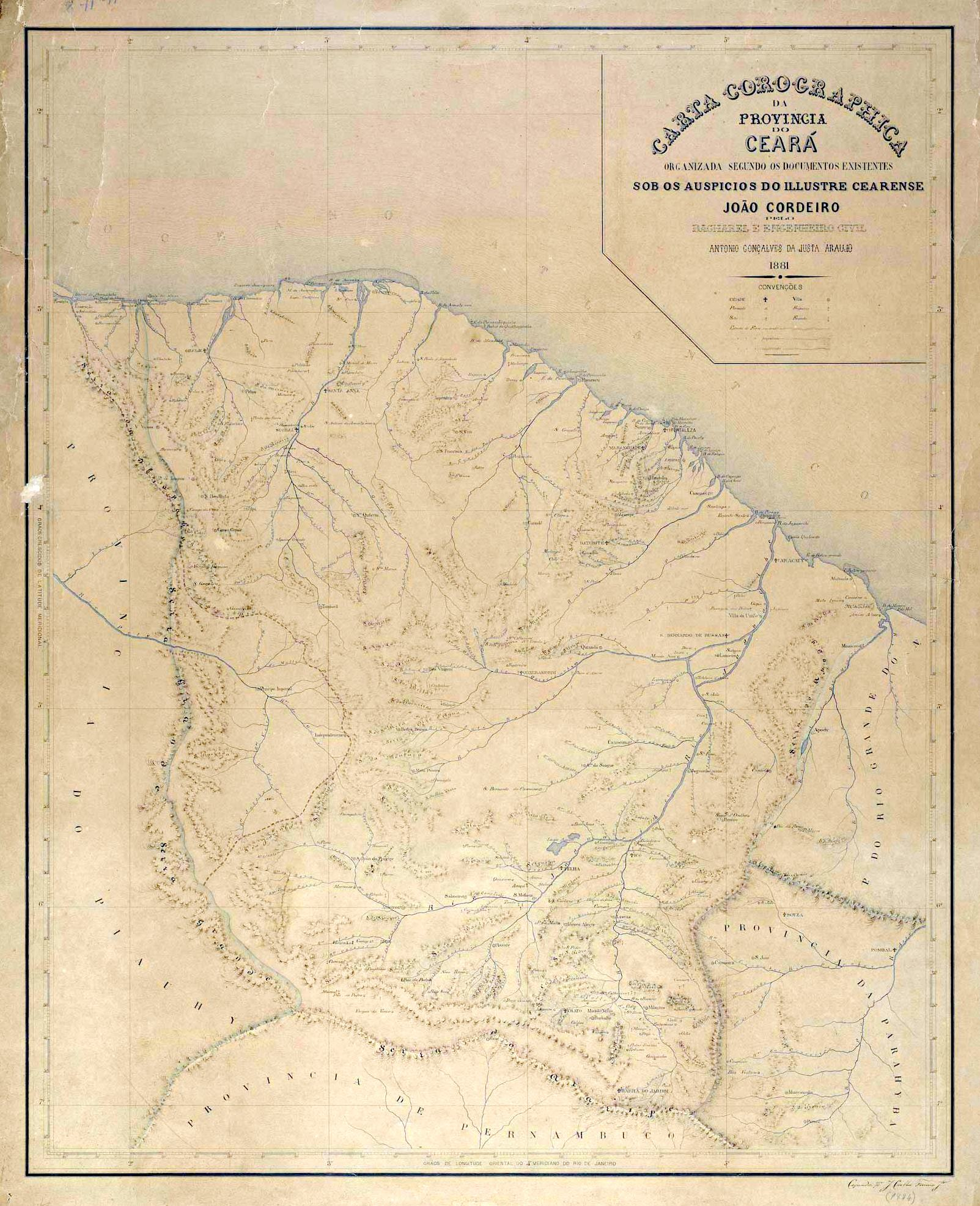 Carta corographica da província do Ceará pelo engenheiro civil Antonio Gonçalves da Justa Araujo de 1881.